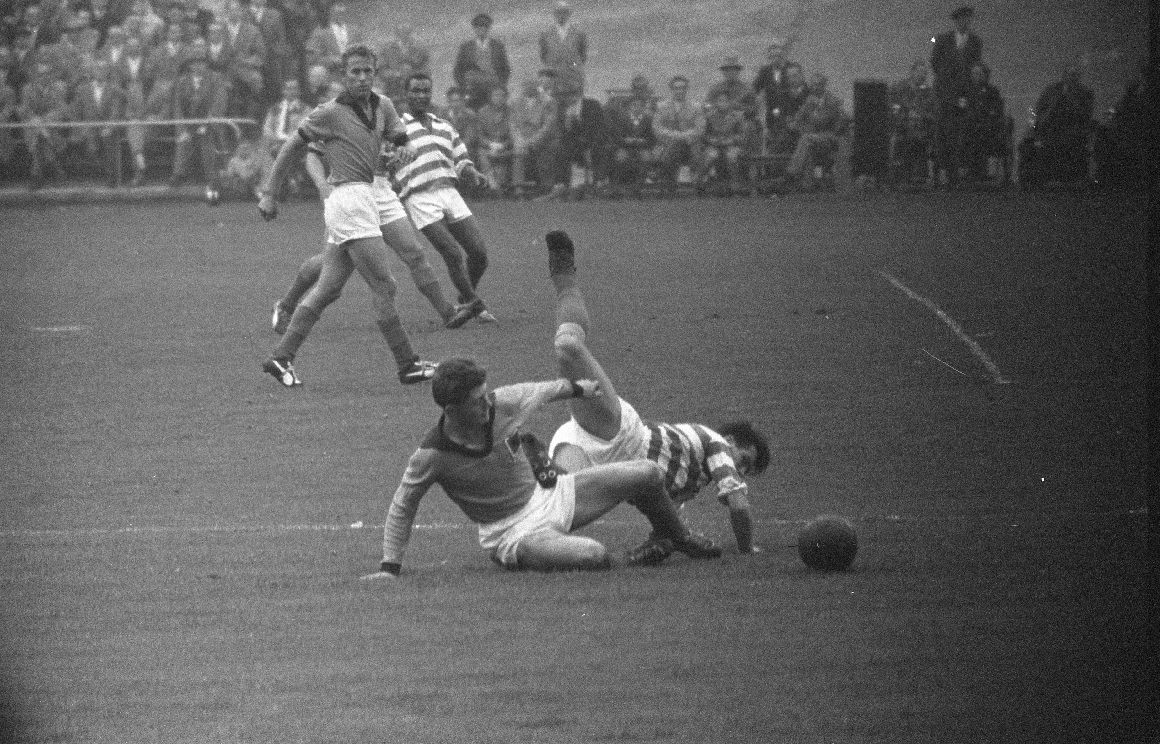 Collectie / Archief : Fotocollectie Anefo Reportage / Serie : [ onbekend ] Beschrijving : Blauw-Wit tegen Volendam 1-3 Datum : 11 oktober 1959 Locatie : Noord-Holland, Volendam Instellingsnaam : Blauw-wit Fotograaf : Rossem, Wim van / Anefo Auteursrechthebbende : Nationaal Archief Materiaalsoort : Negatief (zwart/wit) Nummer archiefinventaris : bekijk toegang 2.24.01.05 Bestanddeelnummer : 910-7362